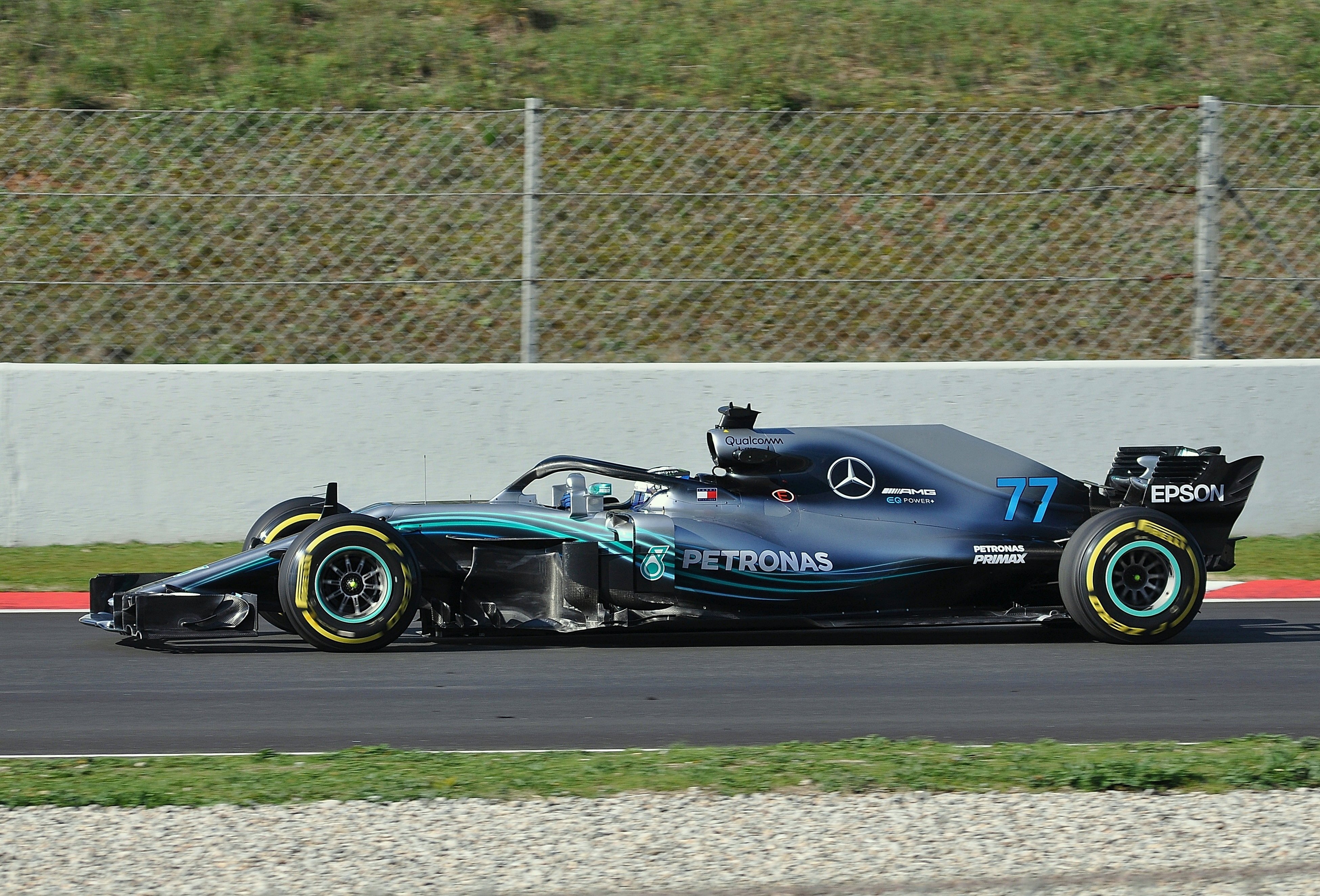 Mercedes W09